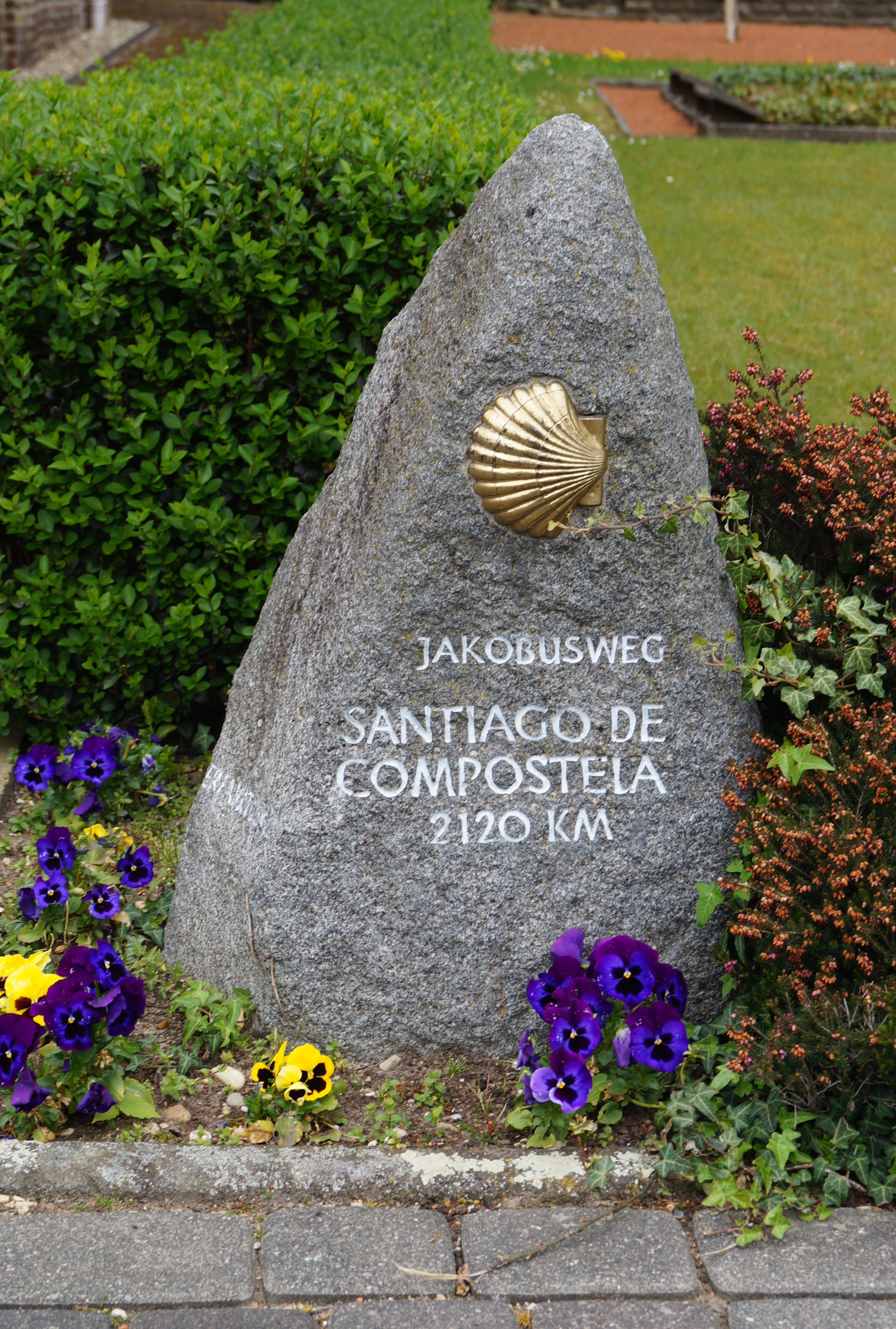 St Jakobus Lüttelforst, auf dem Jakobsweg